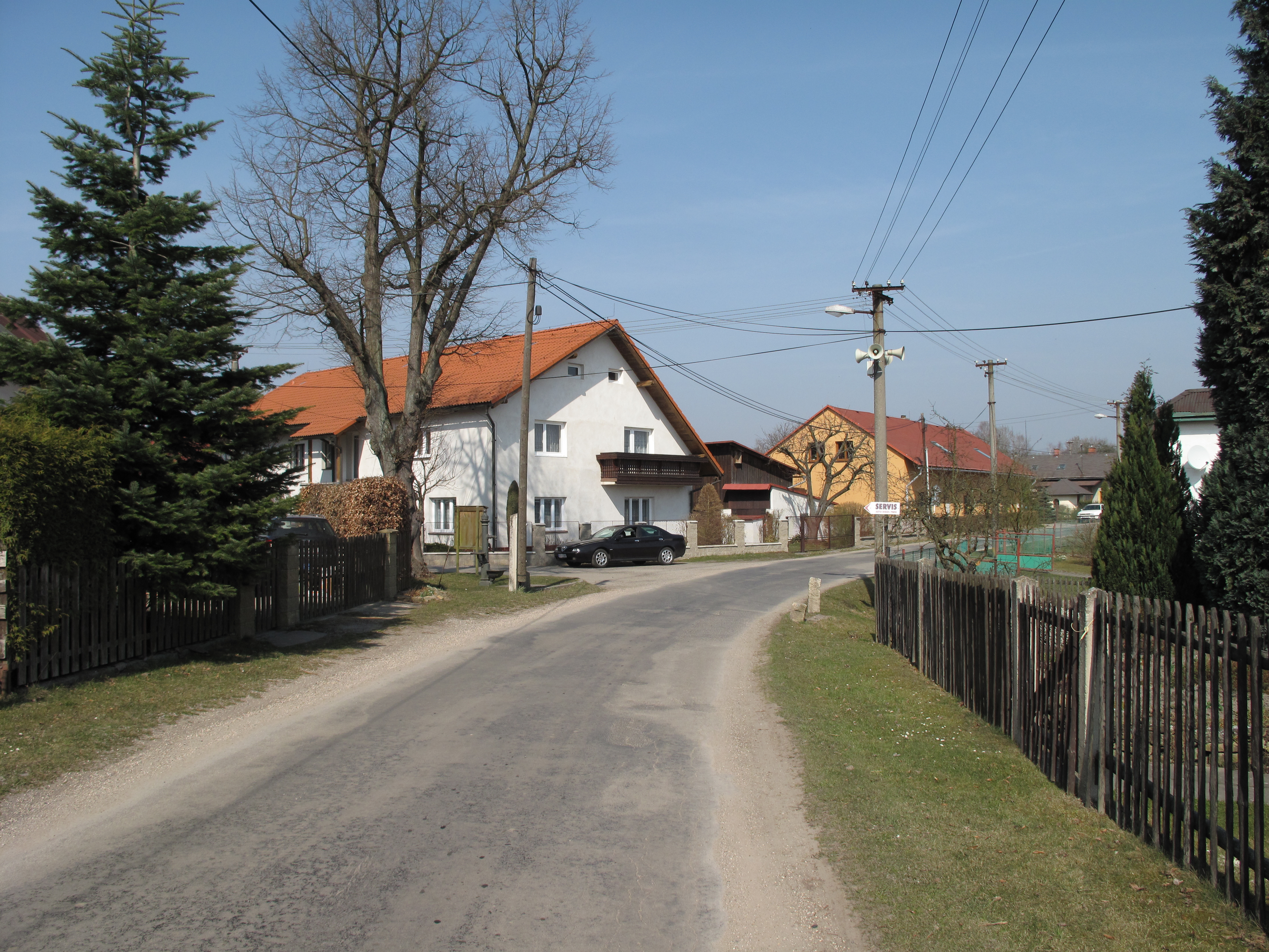 Silnice v Kozmicích. Okres Mladá Boleslav, Česká republika.